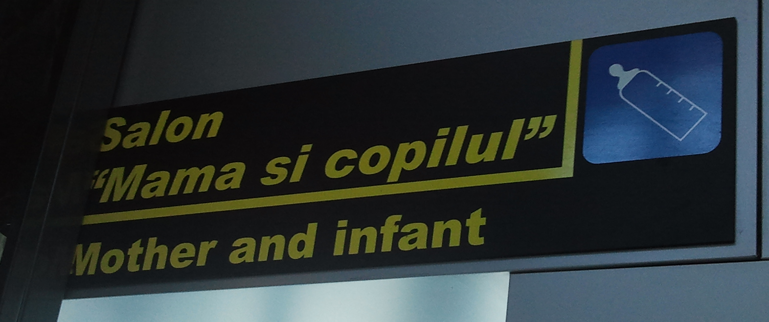 Afis discriminatoriu functie de sexul parintelui in aeroportul Otopeni